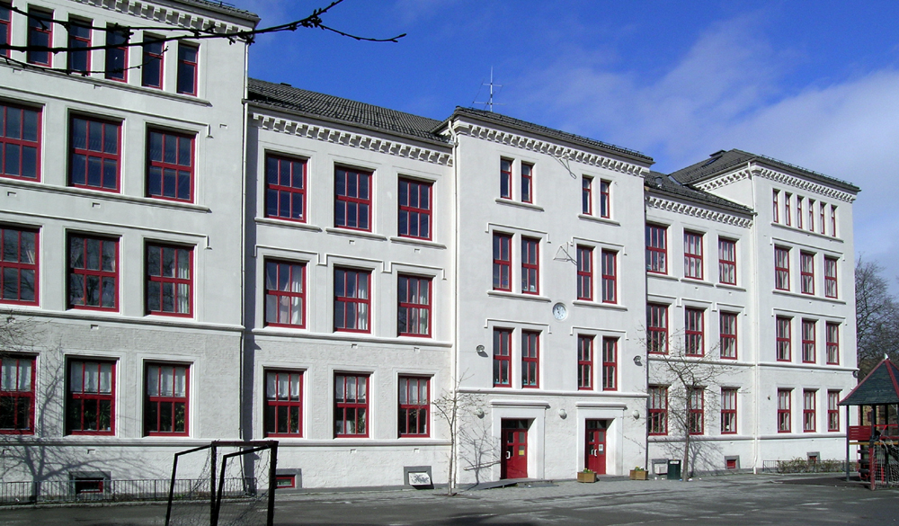 Kalvskinnet skole, Bispegata 9c, Trondheim. Bygd 1885. Arkitekt: Ole Falk Ebbell